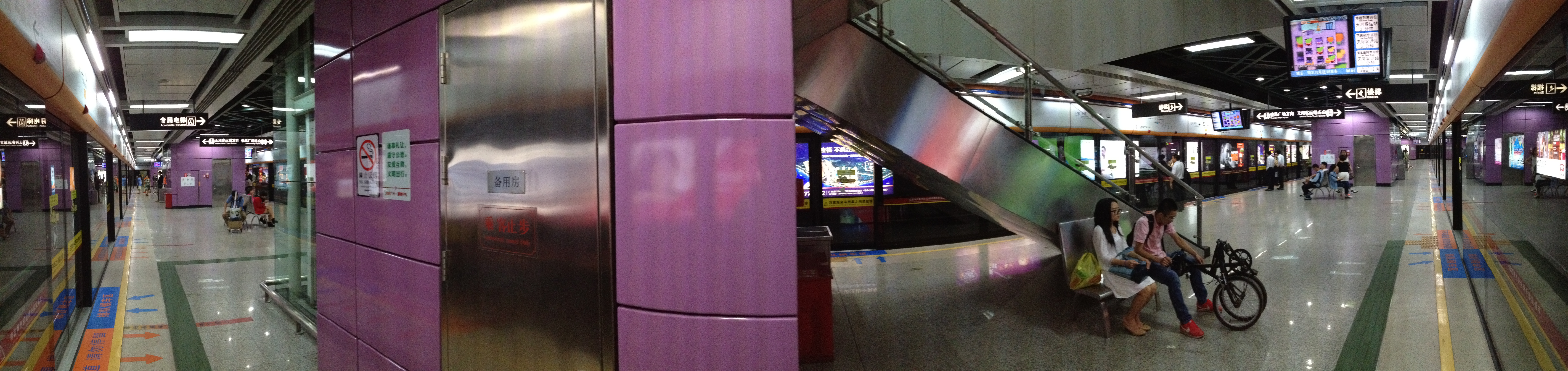 广州地铁五山站月台全景图